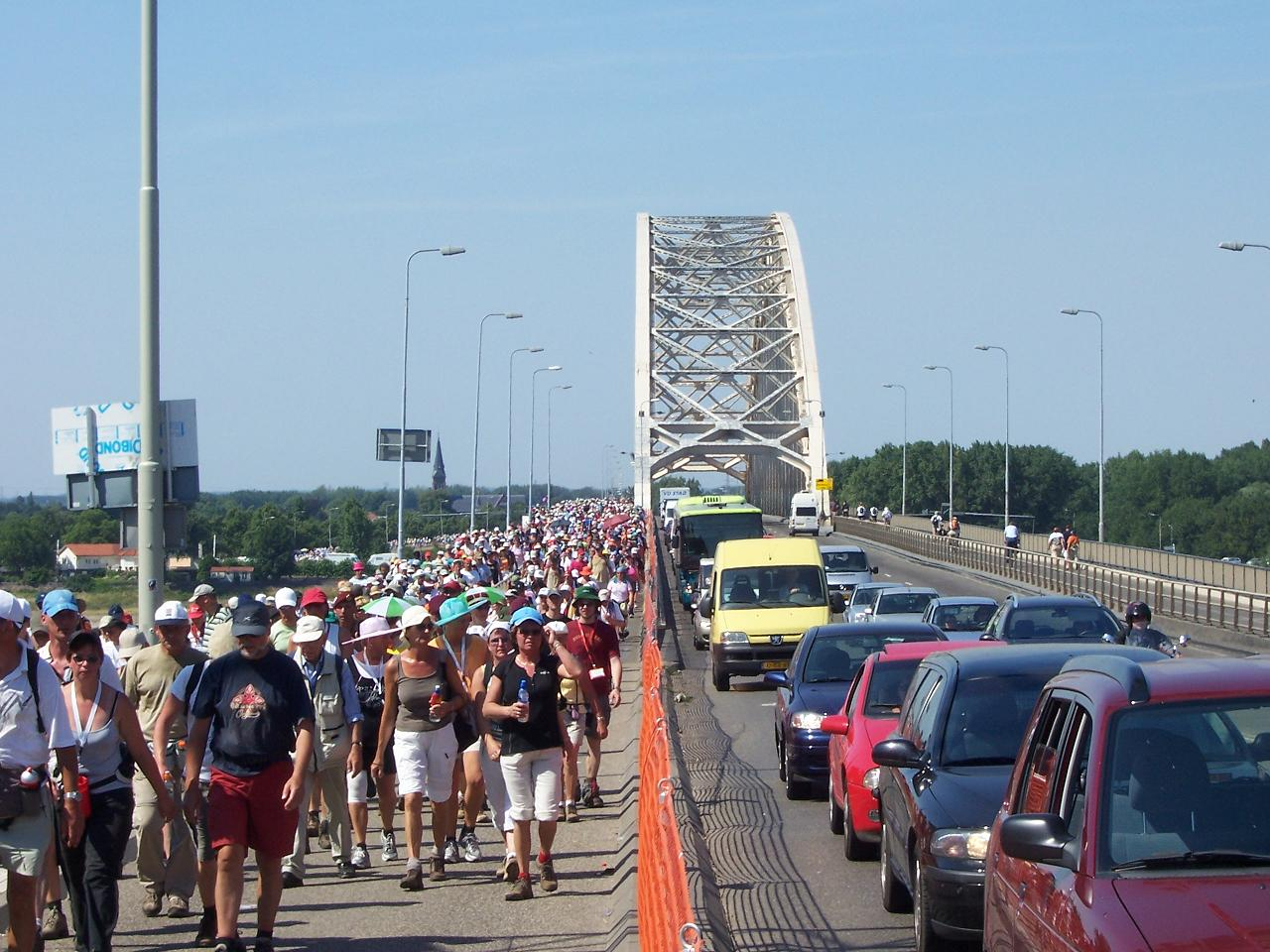 Vierdaagse Afstandsmars Nijmegen